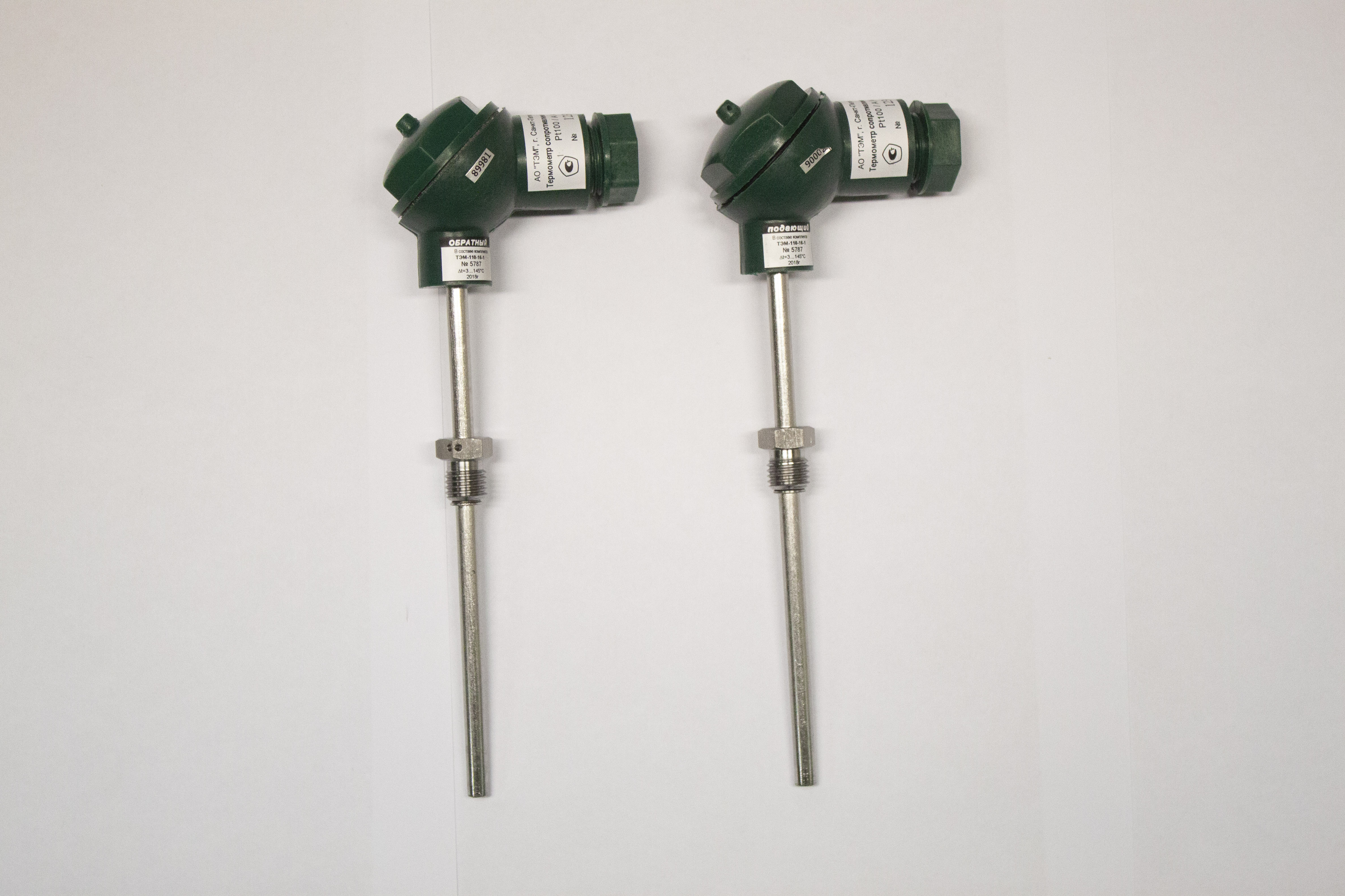 Комплект термометров сопротивления производства АО "ТЭМ"